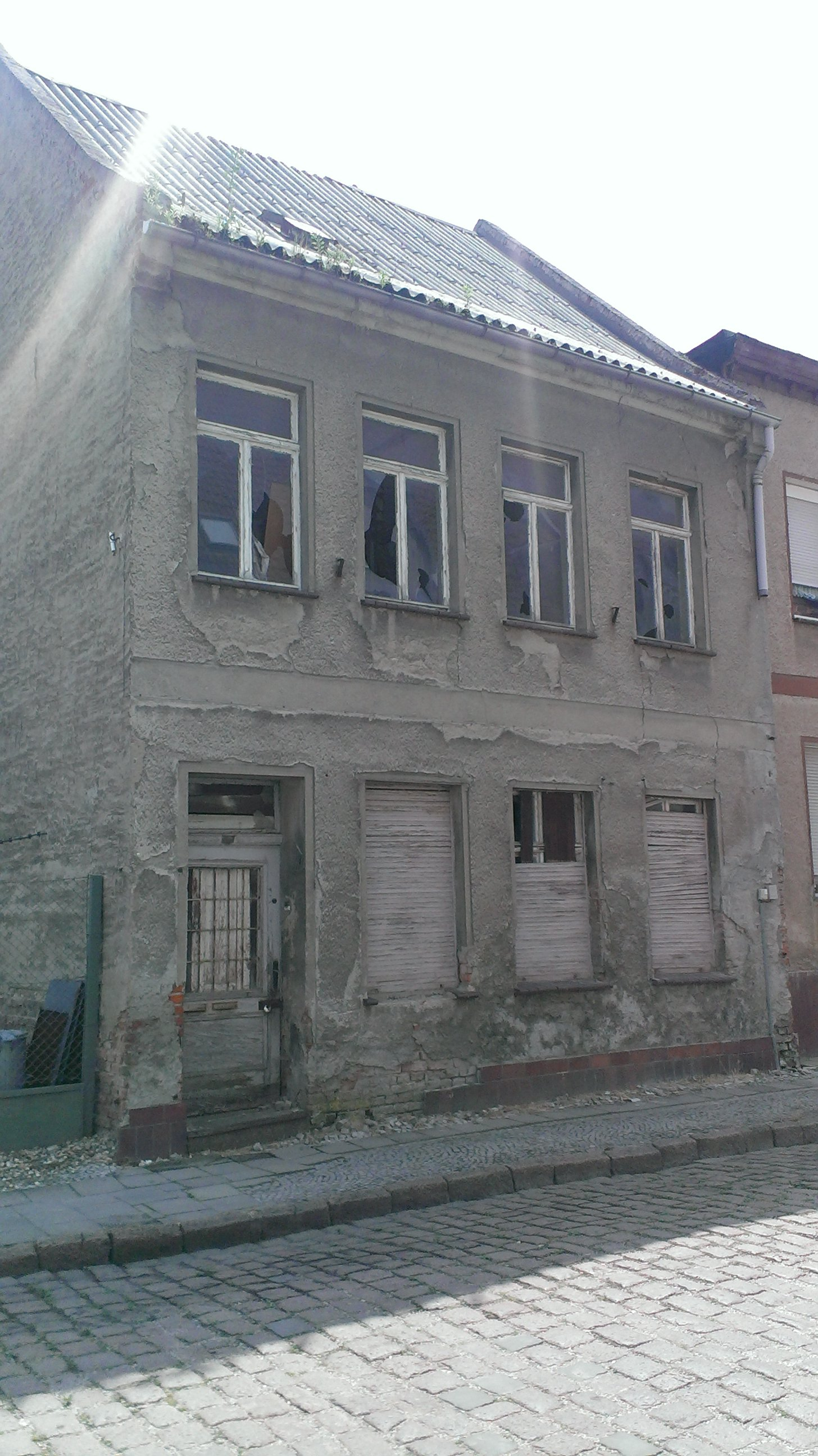 Immer mehr Häuser auf dem Land verfallen, vor allem in Ostdeutschland. Dieses Haus in Calbe (Saale) in Sachsen-Anhalt steht seit der Wende leer und droht, demnächst einzustürzen.